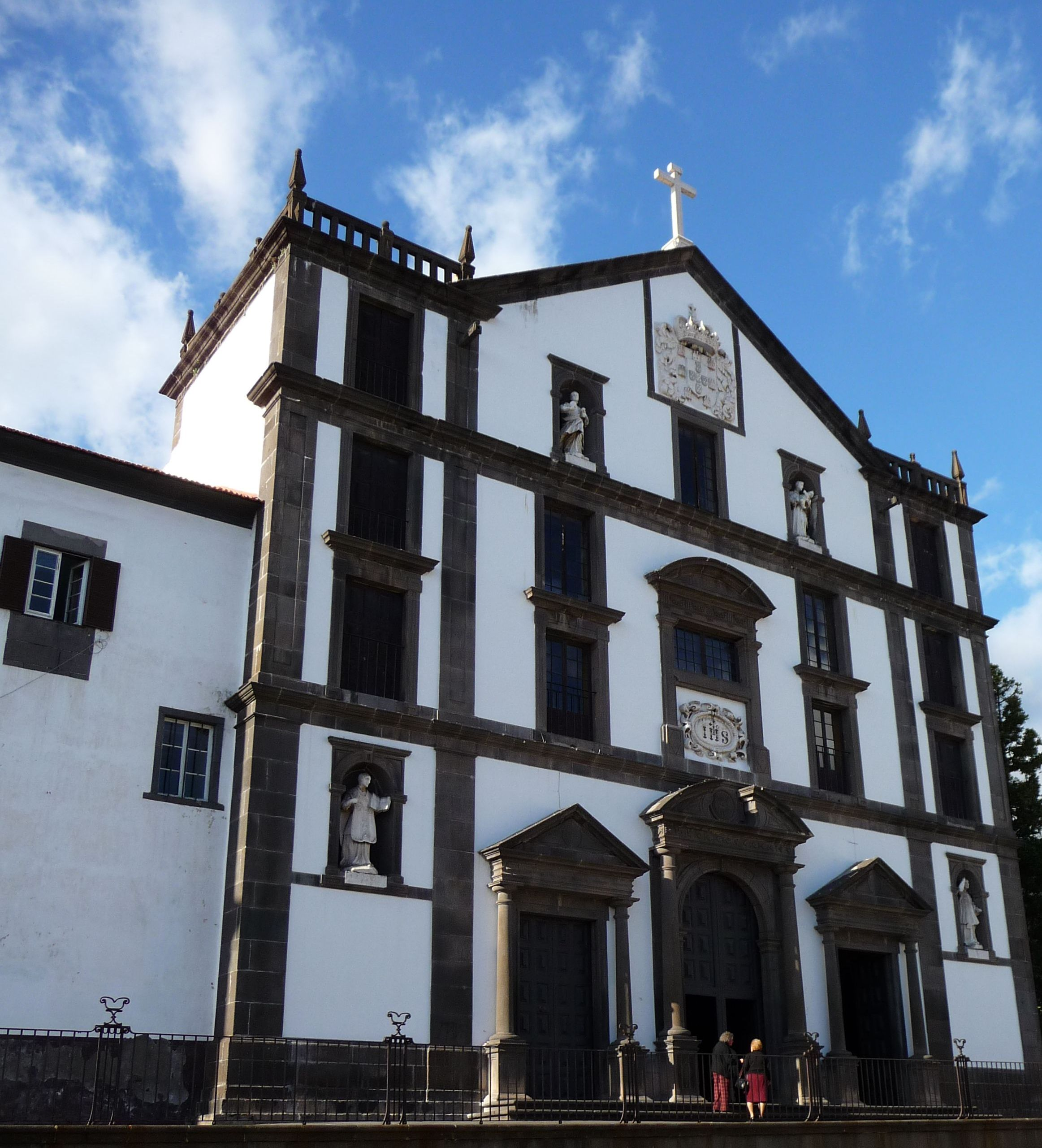 Az egykori kollégiumi templomban most Funchal egyeteme működik (Funchal, Madeira)